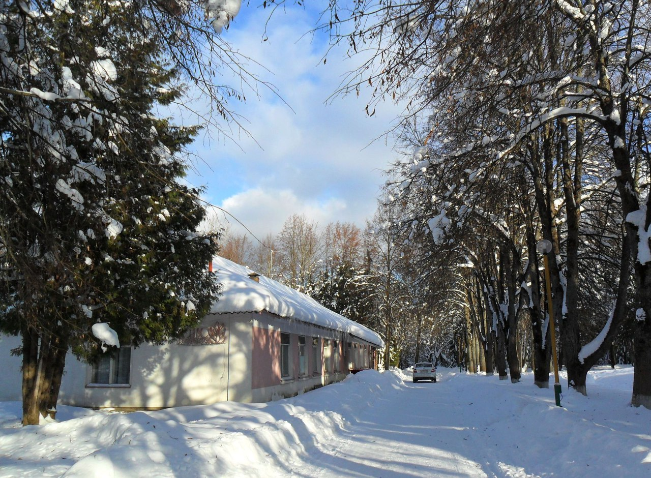 La kutima dometo de APERo